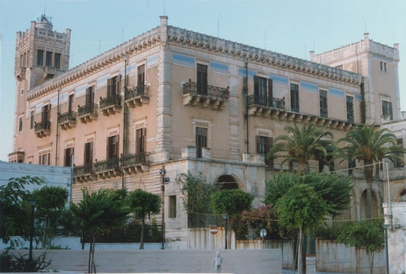 Palazzo Bruno di Belmonte in Stile Liberty - Sede Comunale